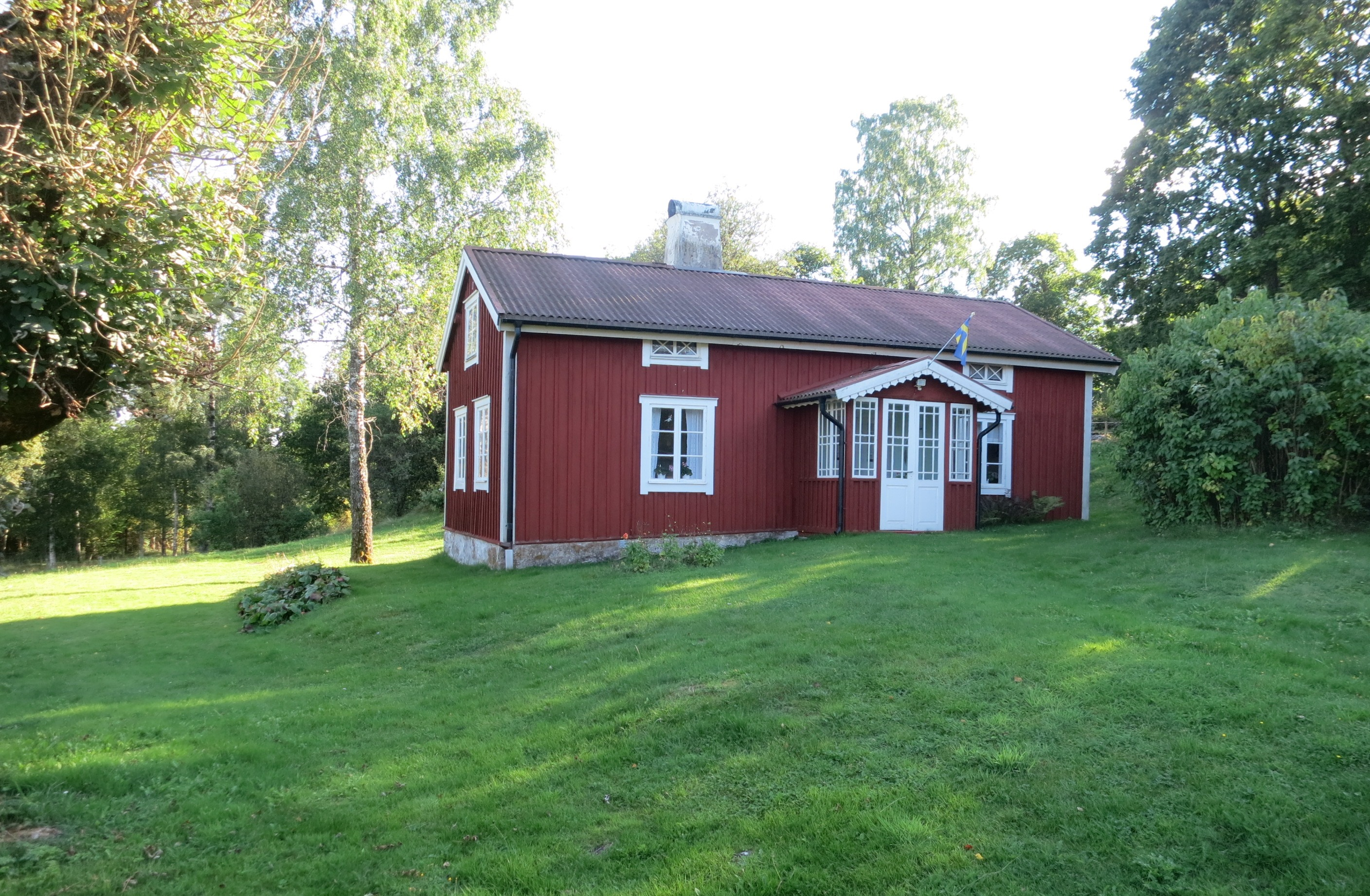 Hembygdsgården Lintalund norr om Torup